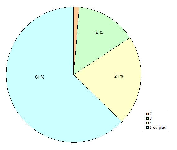 Nombre de pièces des logements à Sarton (Pas-de-Calais, France).